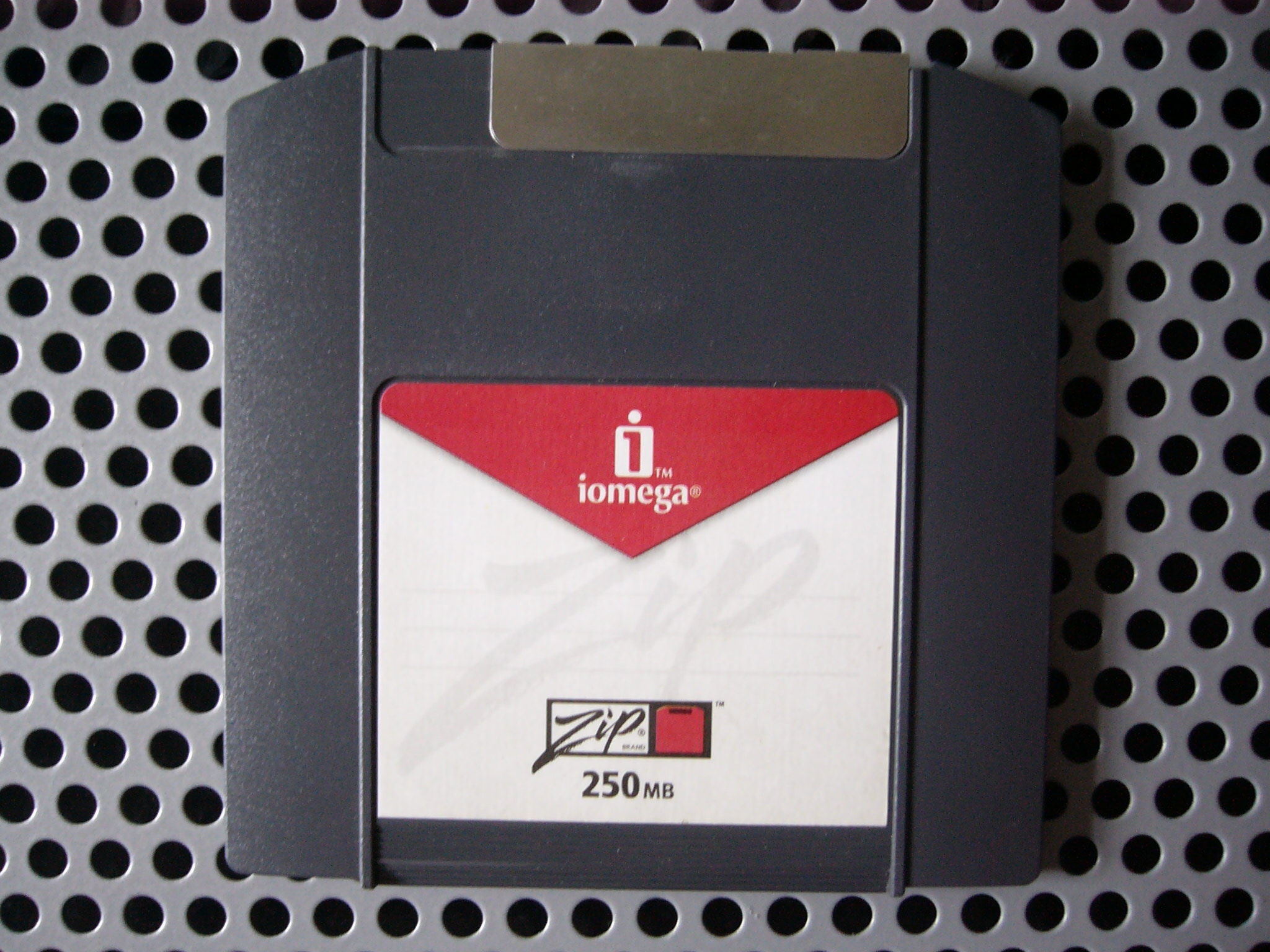 Iomega製造的Zip250磁碟片010401A5BP正面